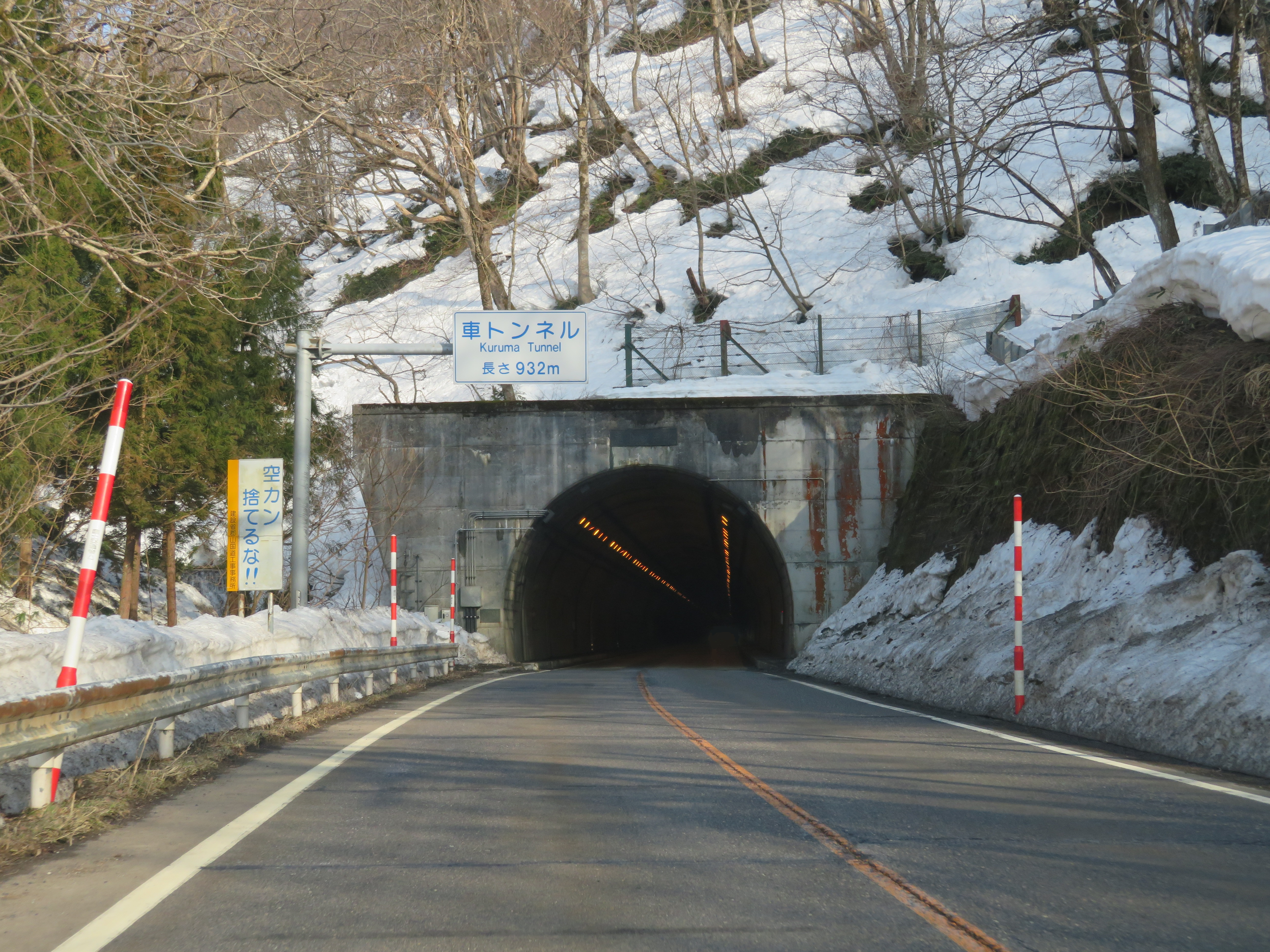 国道49号線車トンネル（新潟方面側坑口から撮影）